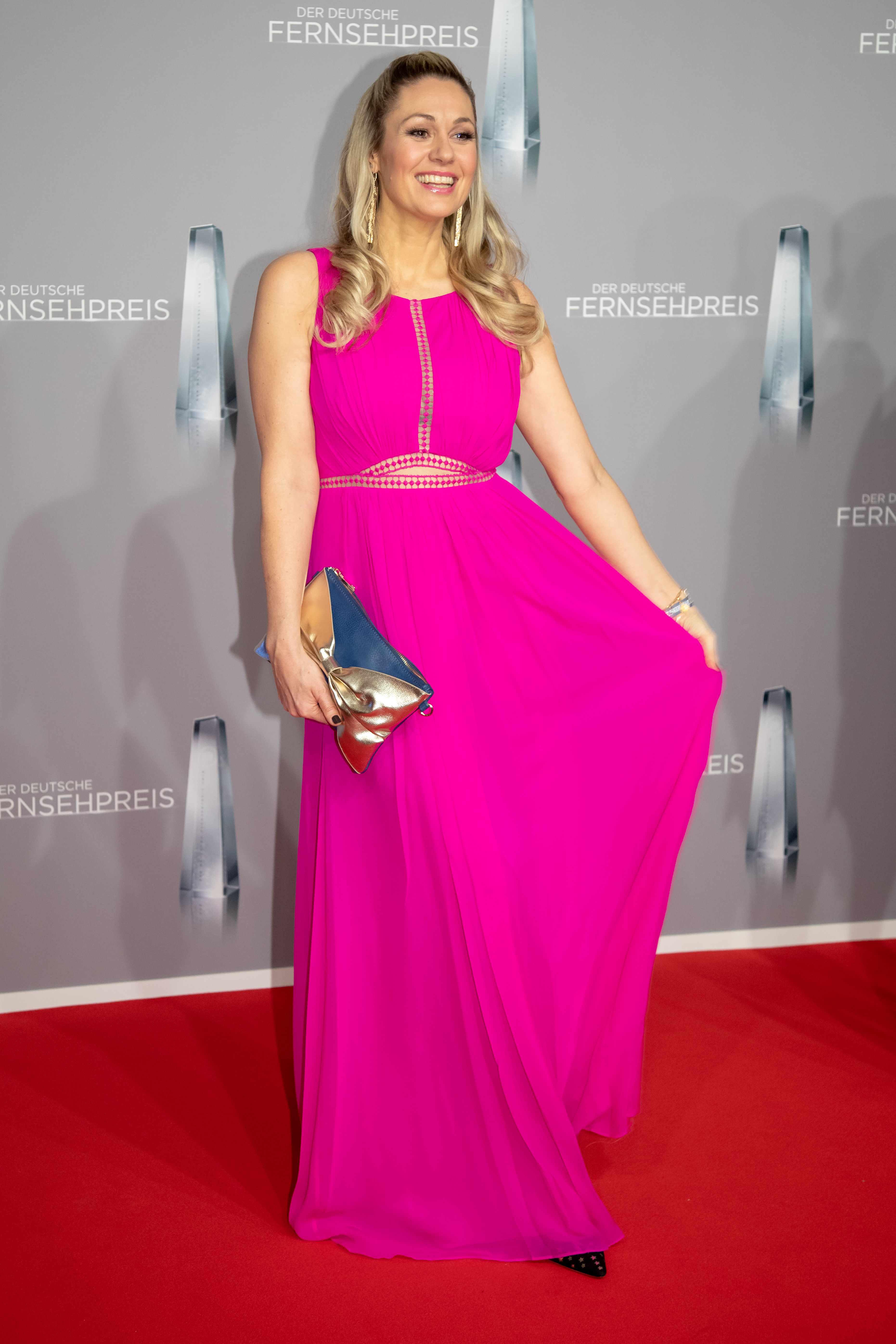 Ruth Moschner beim Deutschen Fernsehpreis 2019 in der Düsseldorfer Rheinterrasse